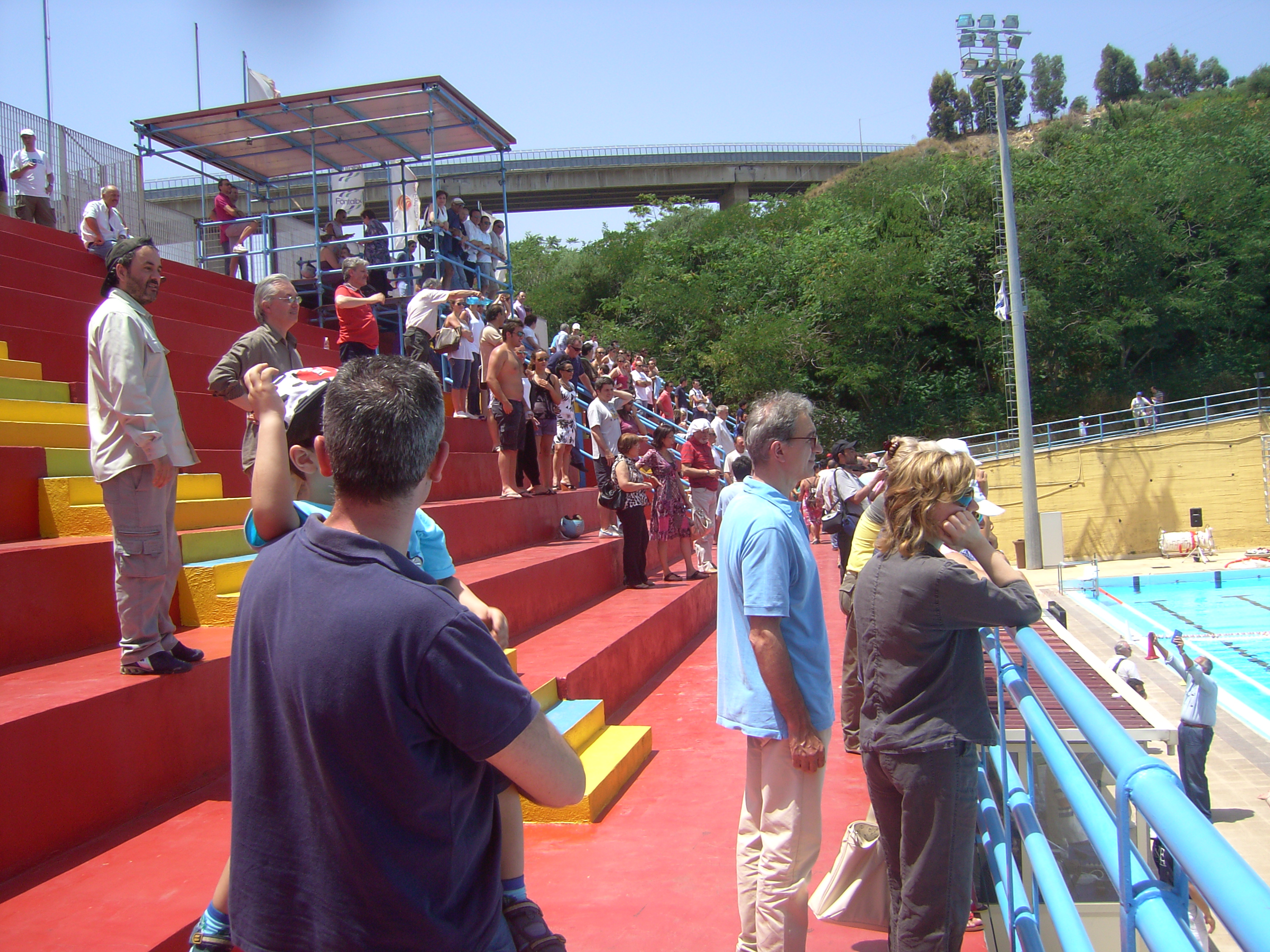 Tribuna piscina scoperta "Cappuccini" di Messina durante gara3 di finale play-off Waterpolo Messina - Firenze